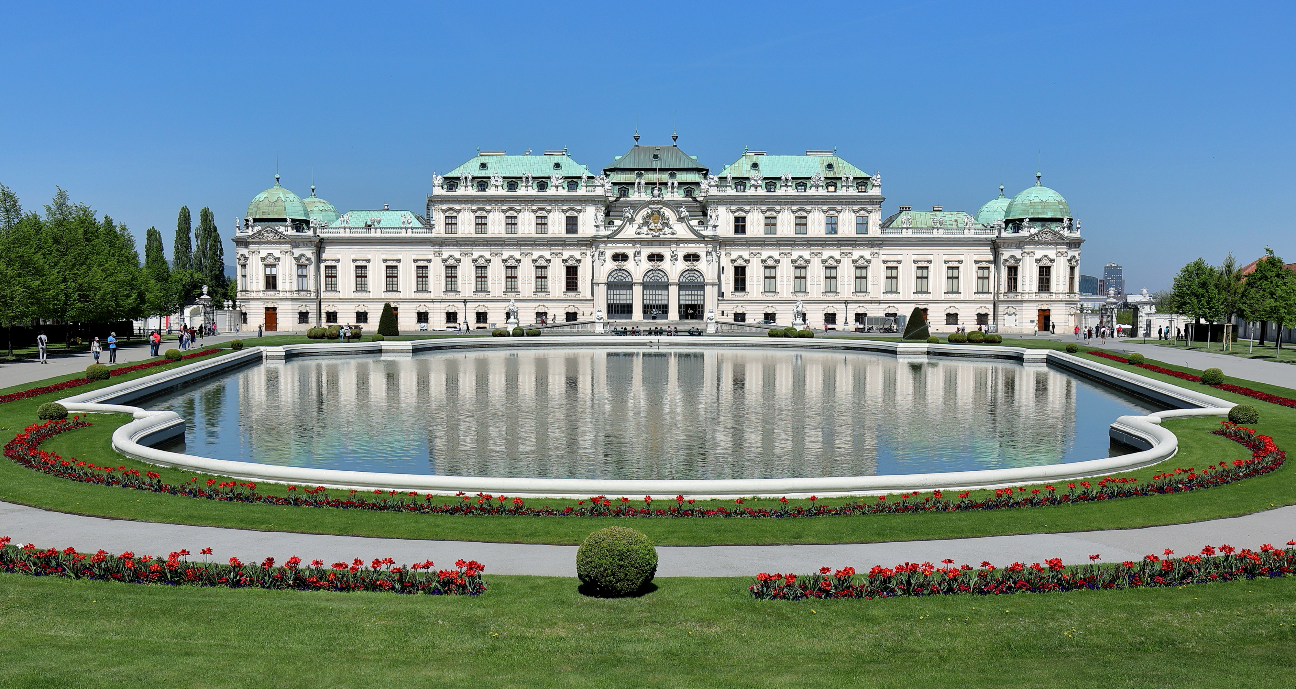 Südansicht des oberen Belvederes im 3. Wiener Gemeindebezirk Landstraße.Die barocke Schlossanlage ließ Prinz Eugen von Savoyen nach Plänen von Johann Lukas von Hildebrandt errichten. Das obere Belvedere diente ihm als Repräsentations- und Festschloss und wurde von 1717 bis 1723 gebaut. Zuvor ließ er von 1712 bis 1716 das untere Belvedere als Sommerwohnsitz errichten. Aktuell (2018) wird das untere Belvedere als auch das obere von der Österreichischen Galerie Belvedere genutzt.